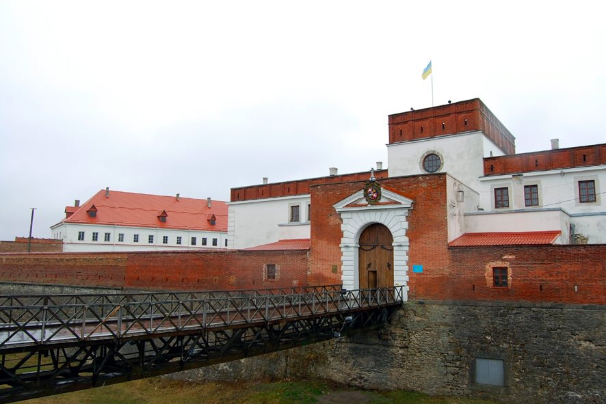 Надбрамний корпус (мур.), Дубно, вул.Шевченка